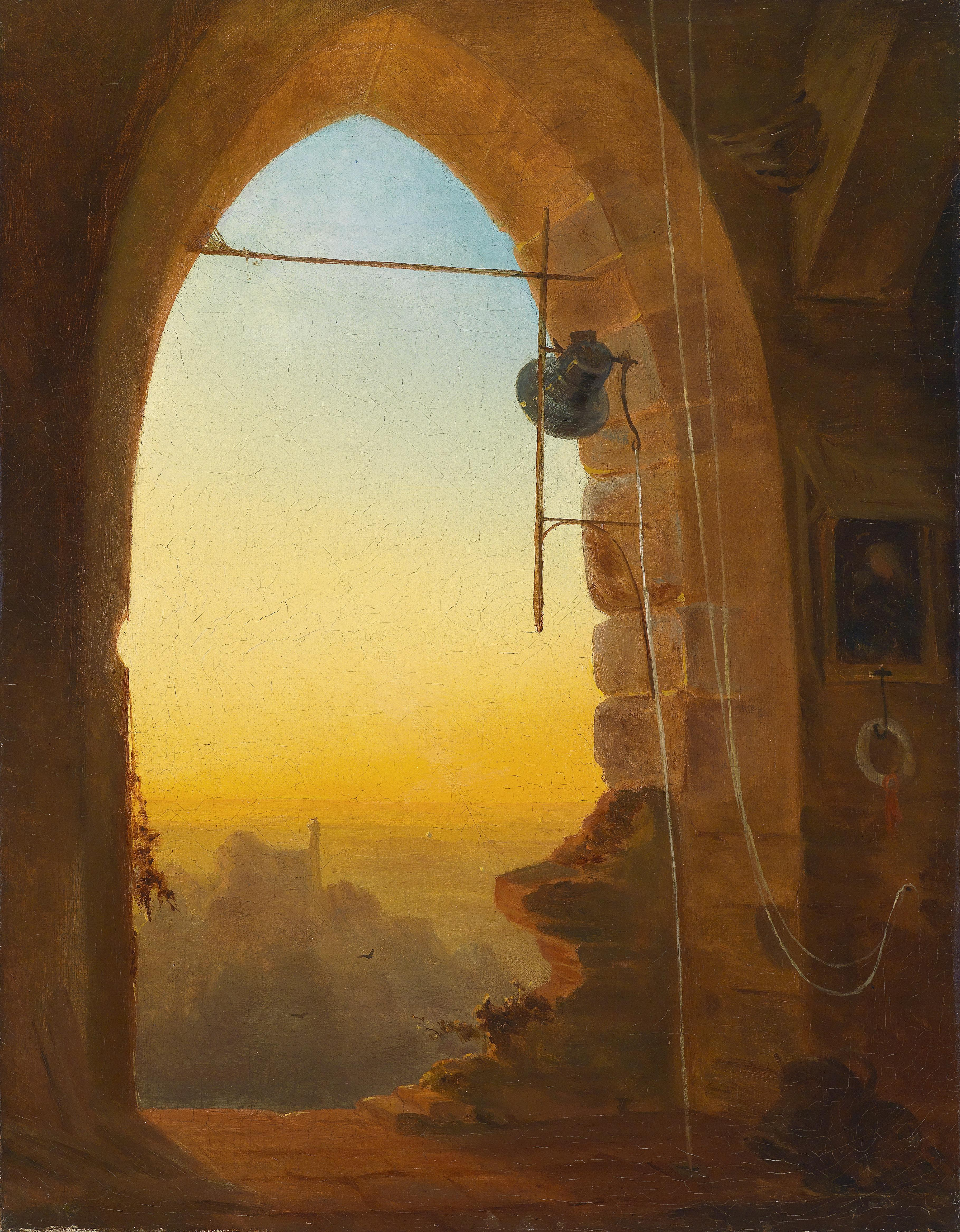 Das Abendläutentitle QS:P1476,de:"Das Abendläuten" label QS:Lde,"Das Abendläuten"